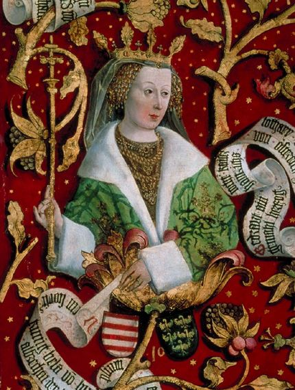 Markgräfin Sophie, 2. Gattin Markgraf Adalberts. (Babenberger Stammbaum, Stift Klosterneuburg) - HEILWIG (SOPHIE) VON UNGARN (ARPADEN)